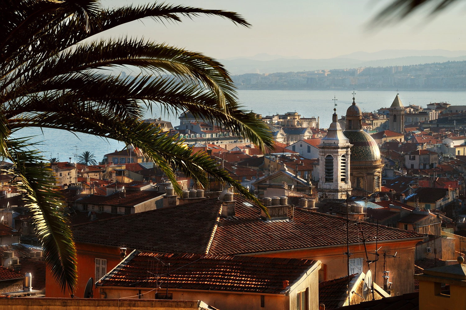 Ницца, Франция. Вид на старый город и Собор Св. Репараты